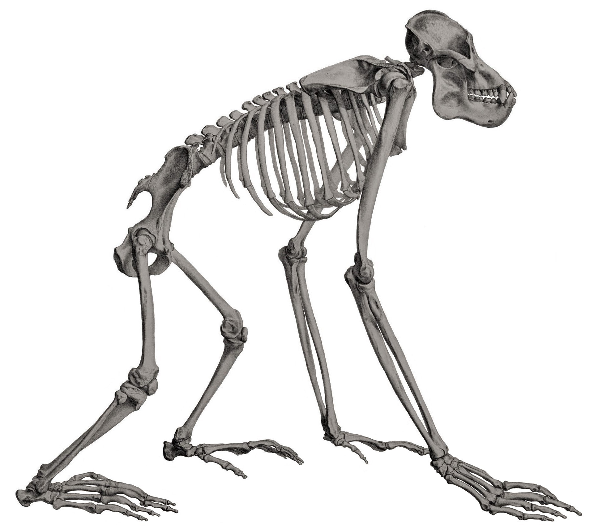 Bornean orangutan skeleton